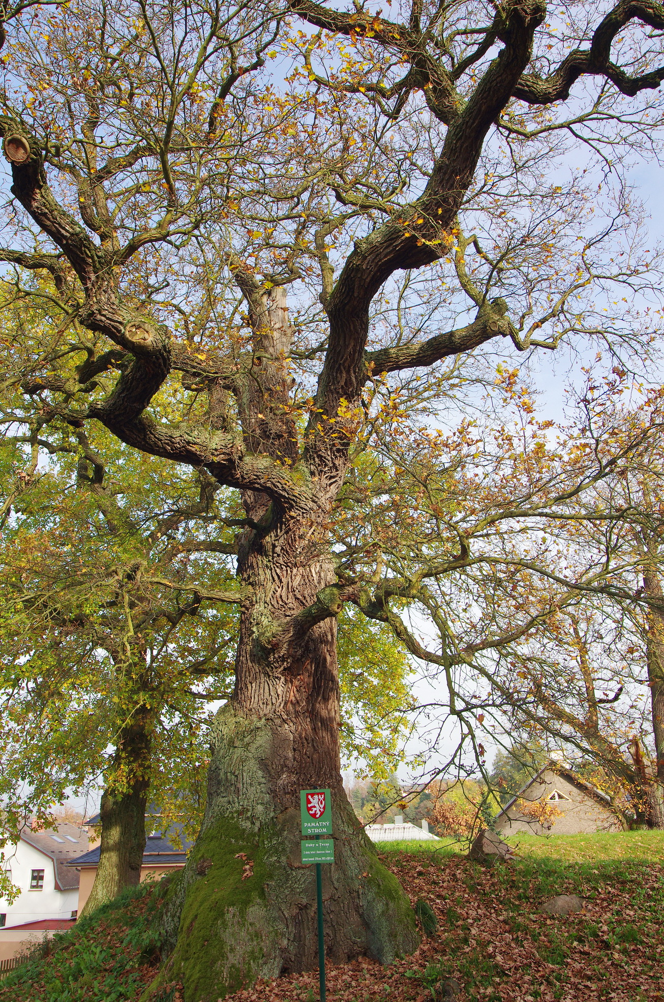 Památné stromy Duby u tvrze, Dalovice, okres Karlovy Vary